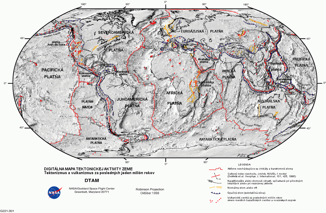 Mapa tektonických platní